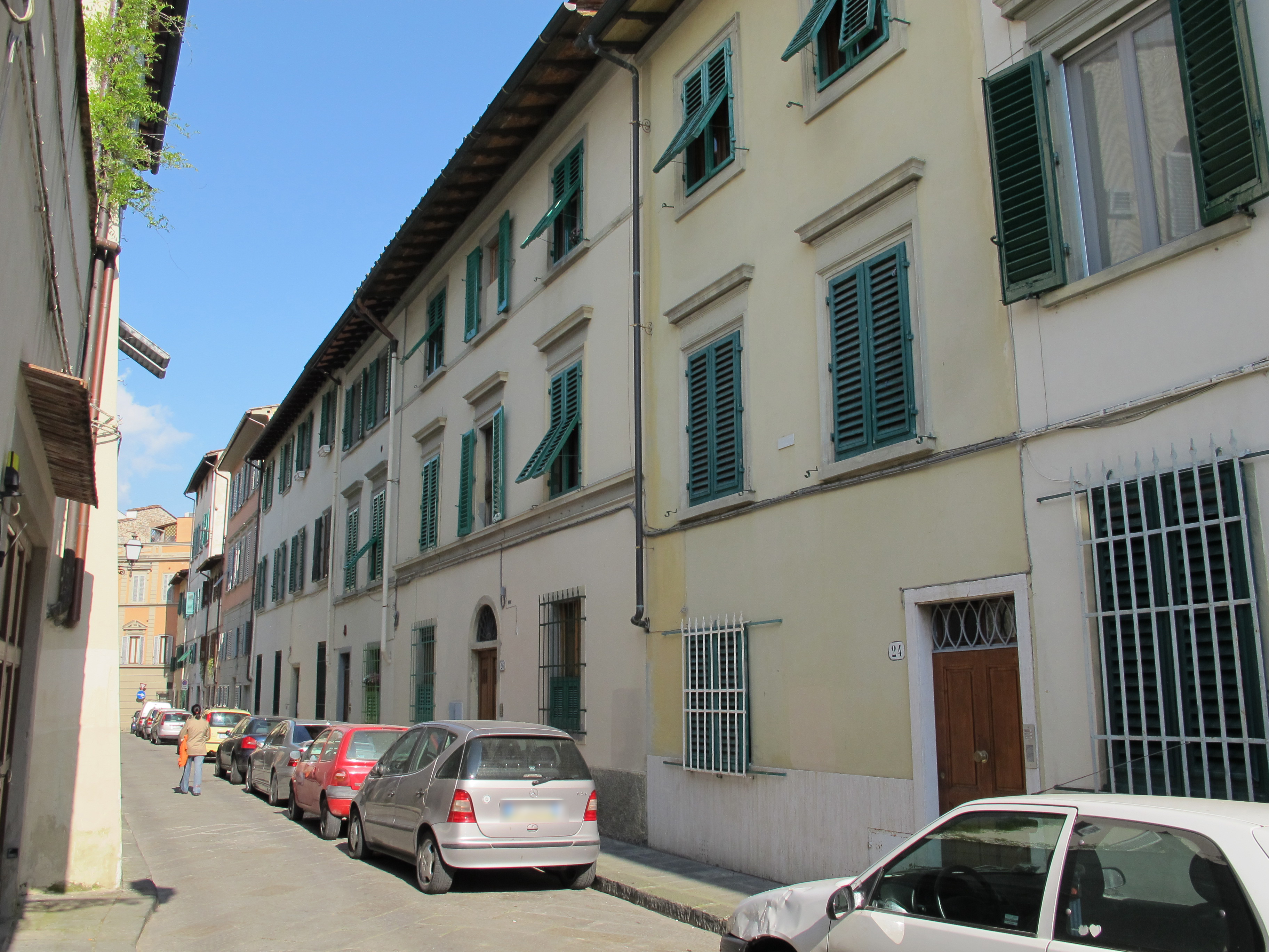 Via della casine, veduta